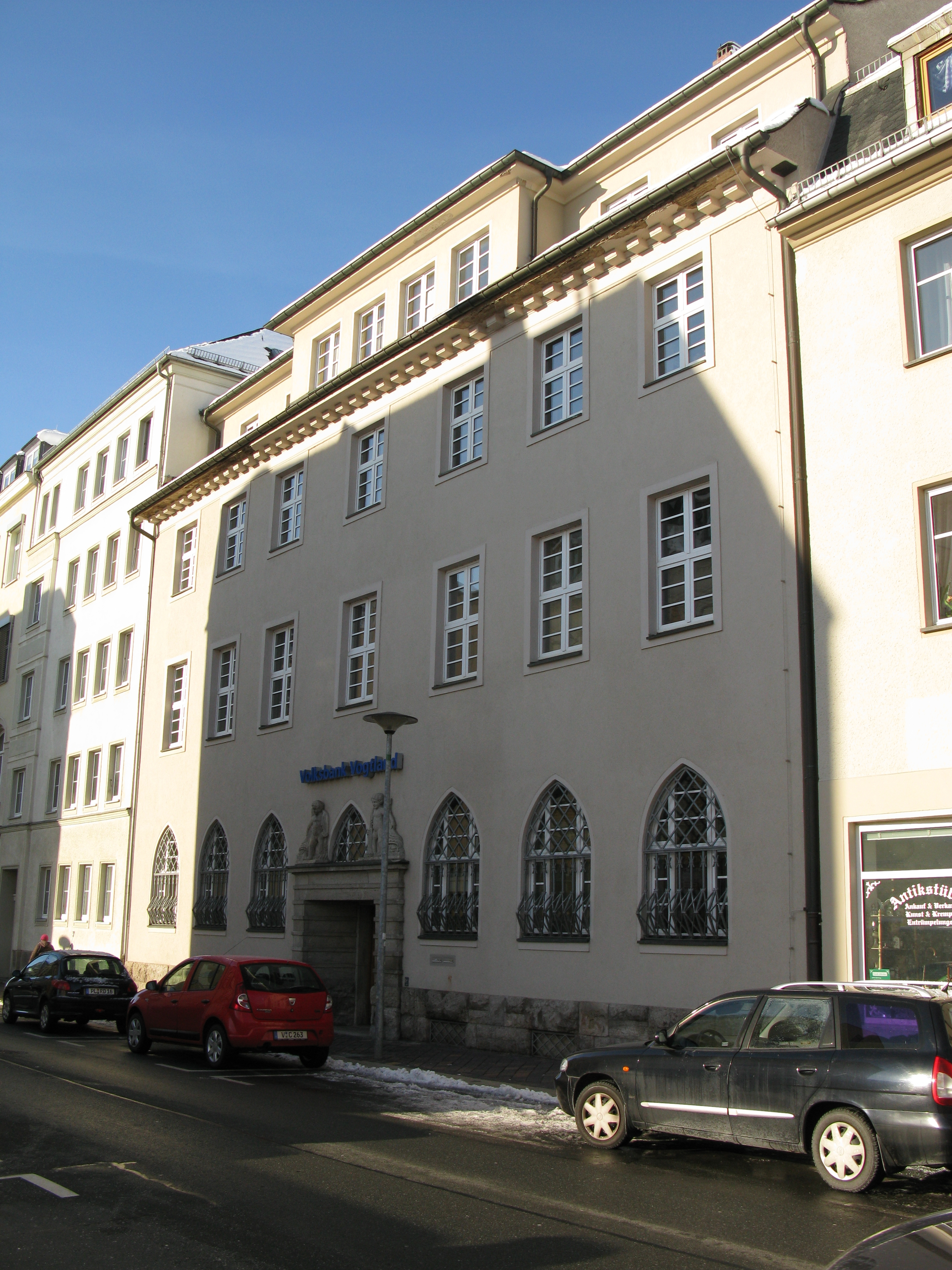 Plauen, denkmalgeschütztes Haus in der Jößnitzer Straße (Jößnitzer Straße 5).